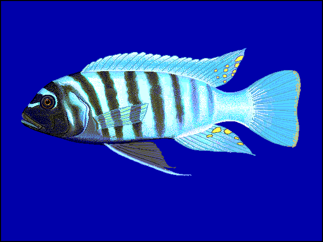 Maylandia zebra (= Metriaclima zebra, Pseudotropheus zebra)